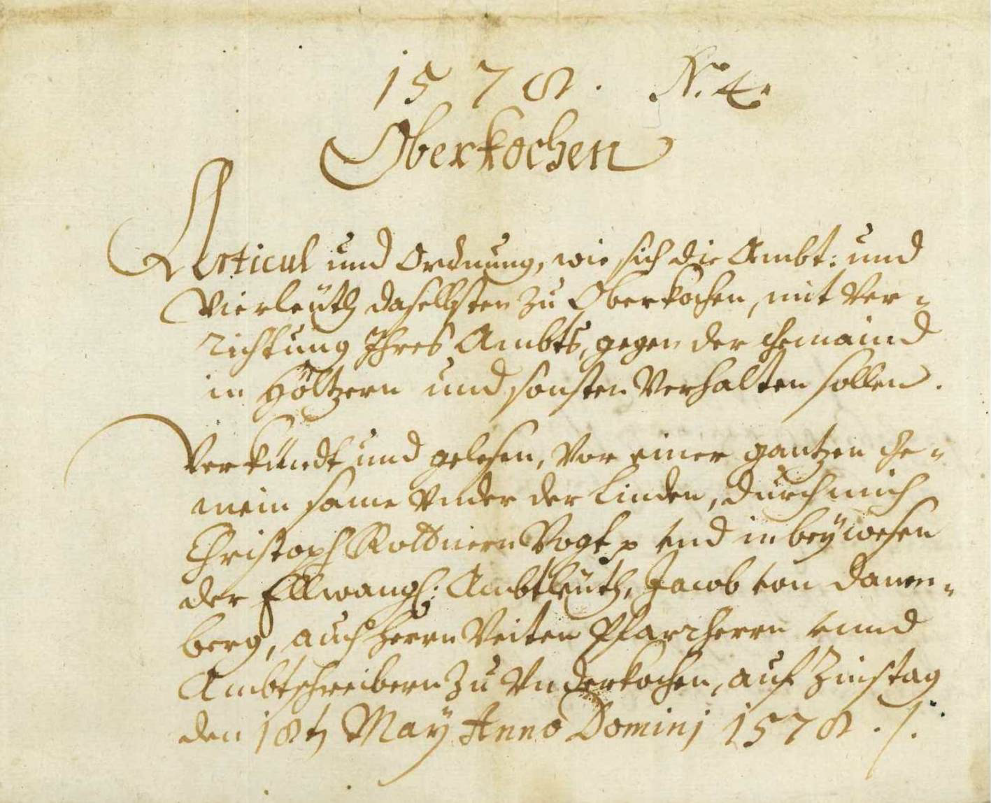 Forst- und Polizeiordnung von Oberkochen, auf die sich 1578 der katholische Fürstpropst von Ellwangen und der evangelische Herzog von Württemberg für das geteilte Dorf einigten.